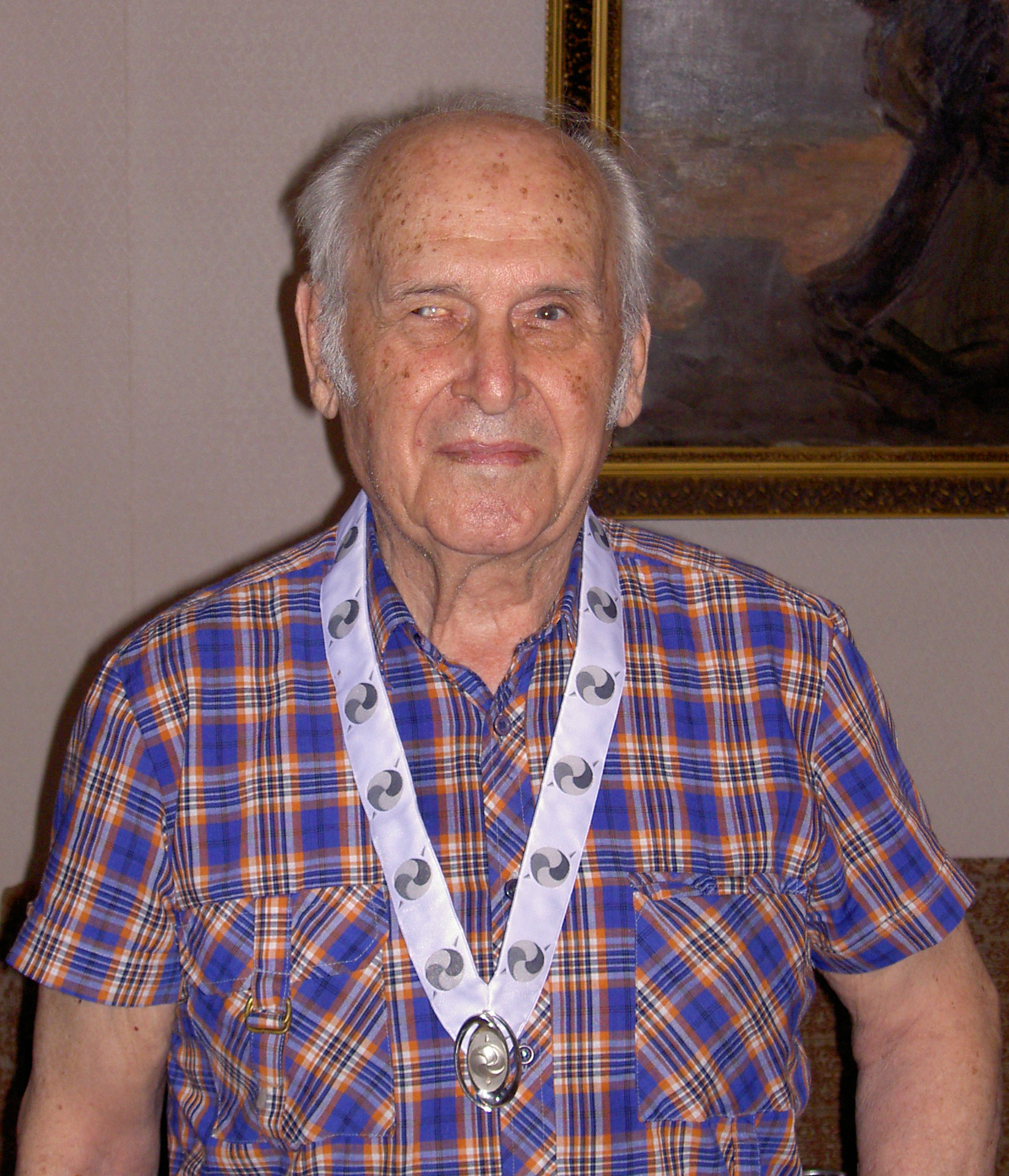 Академик В. Г. Солодовников с орденом Компаньонов Оливера Тамбо